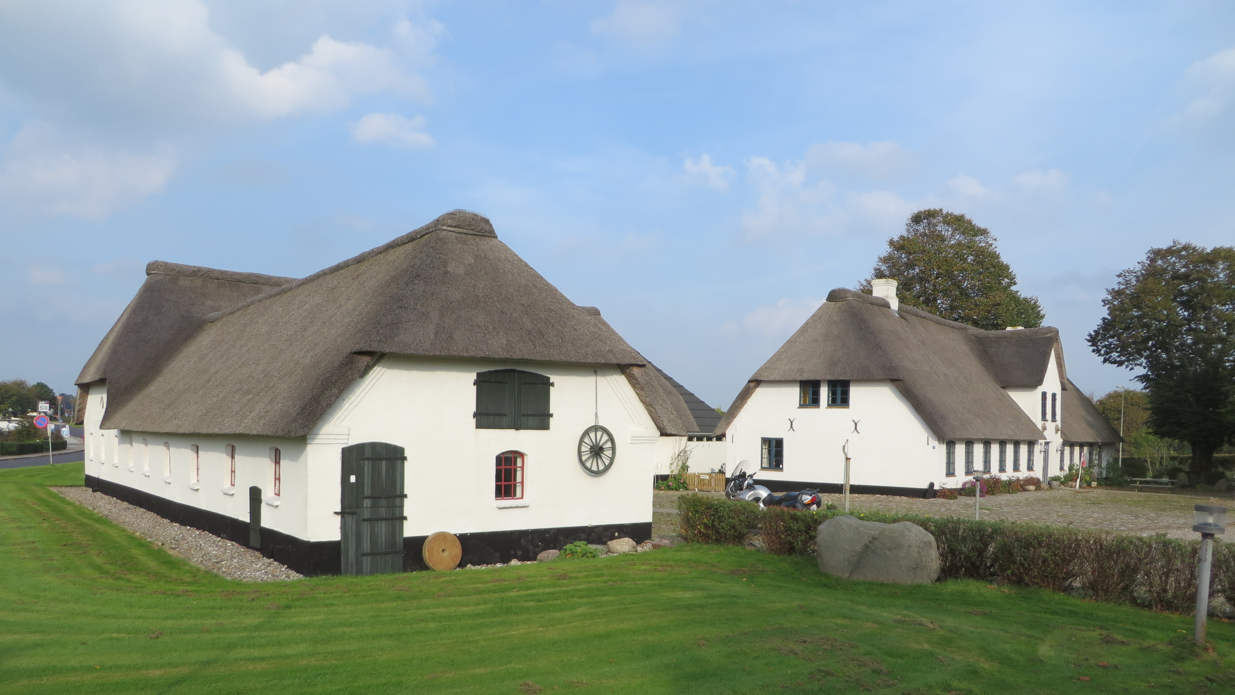 Der Hof Oldemorstoft (mit kleinem Shadow Selfie)